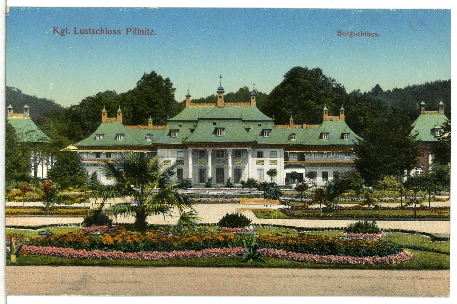 Dresden; Königliche Lustschloß Pillnitz, Bergschloß This postcard is from publisher Brück & Sohn in Meißen ( postcard has a unique number 12677 and is available in a higher resolution at the publisher. This images was uploaded in a cooperation project between Wikipedians and the publisher.